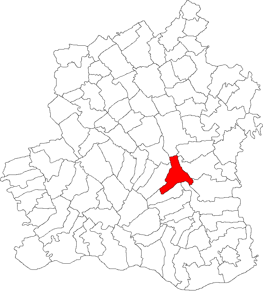 Categorie:Hărţi ale judeţului Teleorman